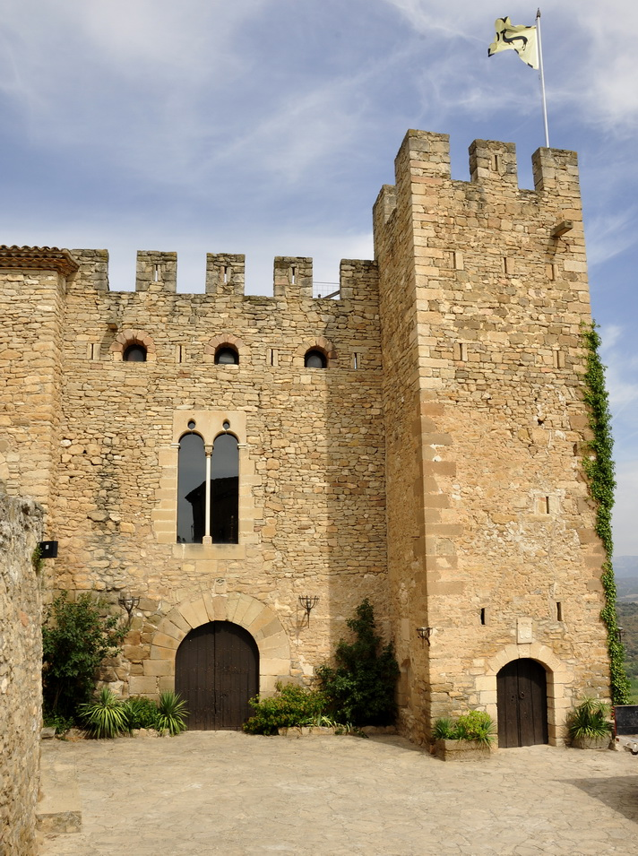 Façana principal del castell